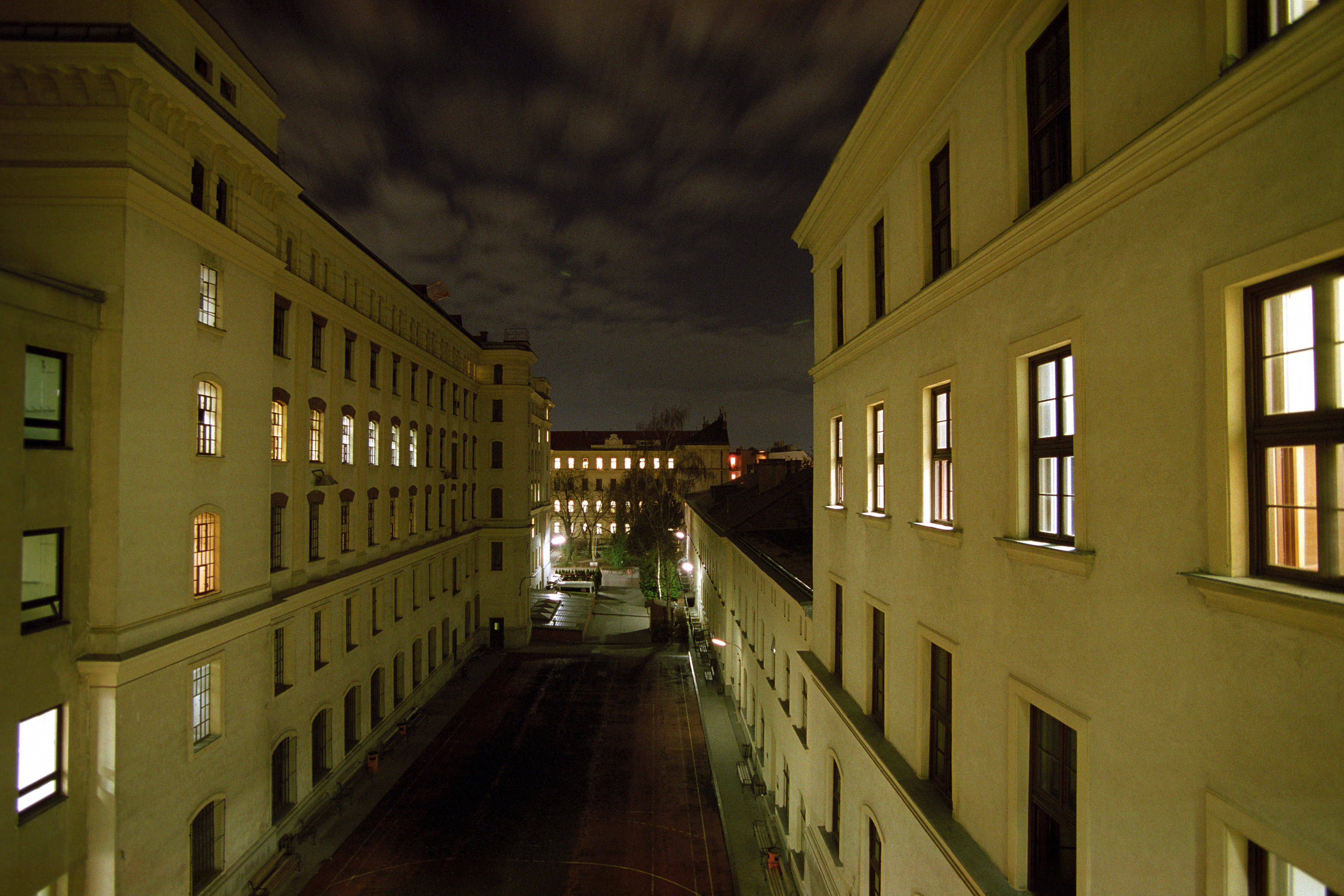 Schulhof der HTL Spengergasse bei Nacht